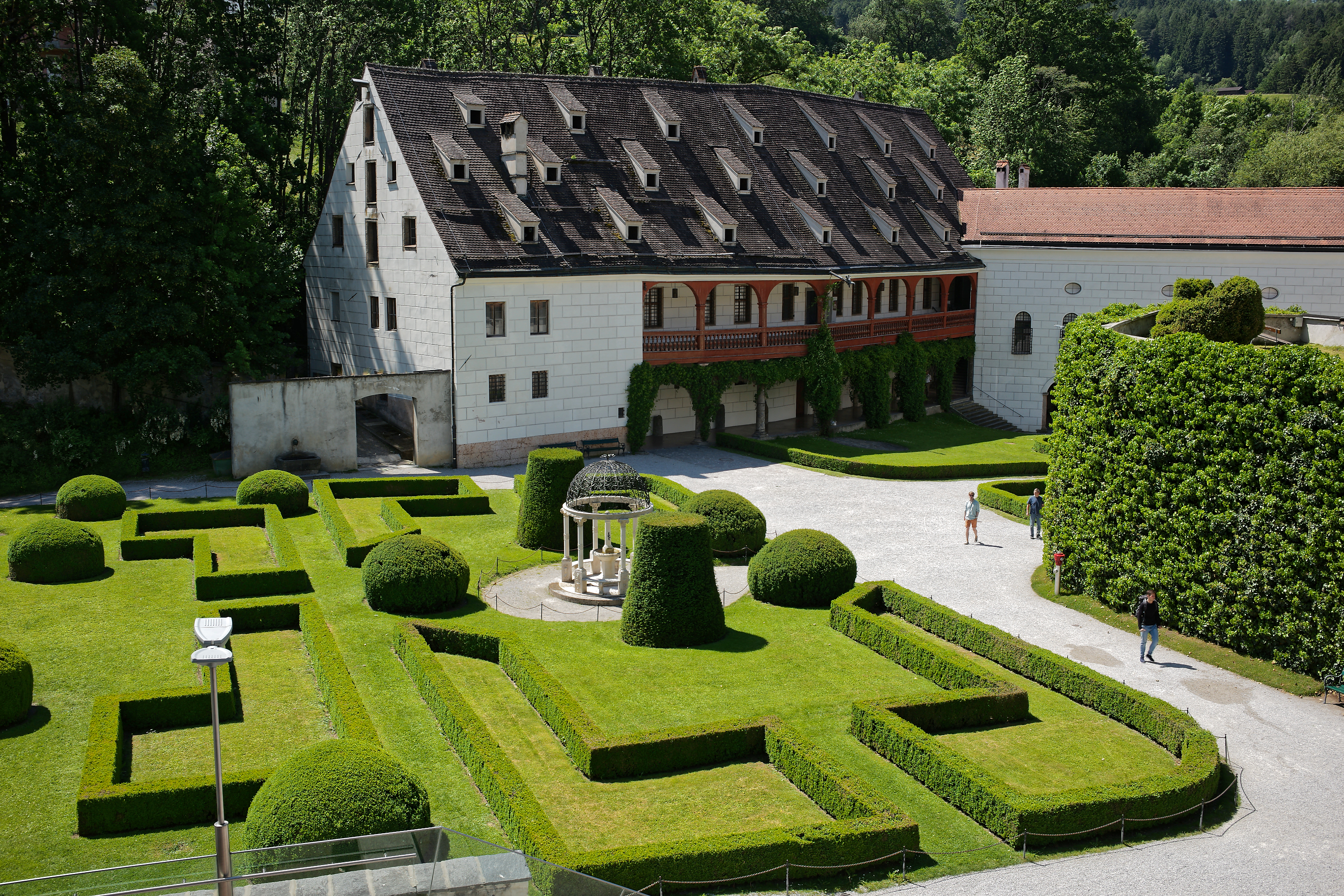 Schlossanlage und Garten von Ambras, aussen